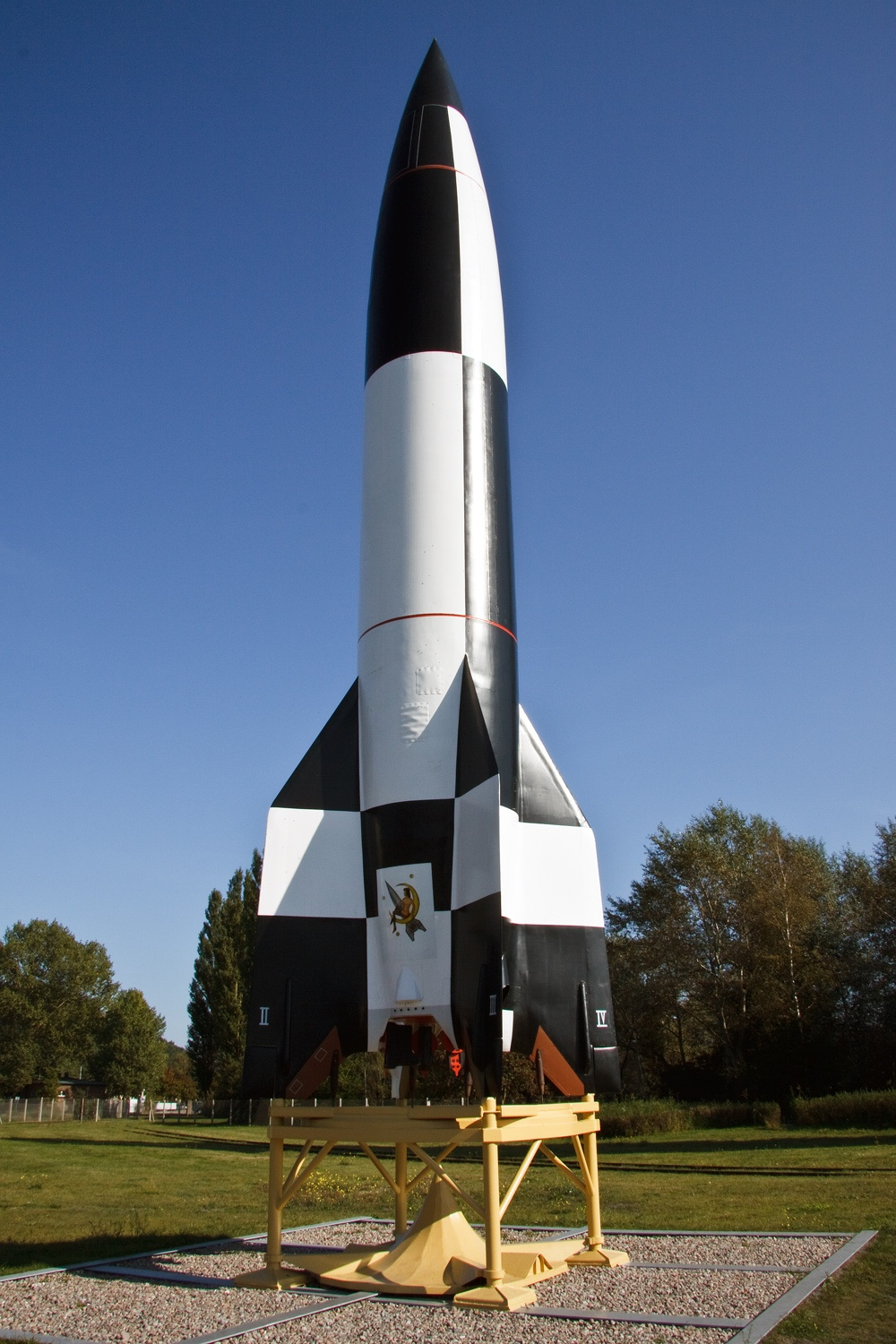 Museum in Peenemünde, Datum/Uhrzeit: 20.09.2009 15:00:06